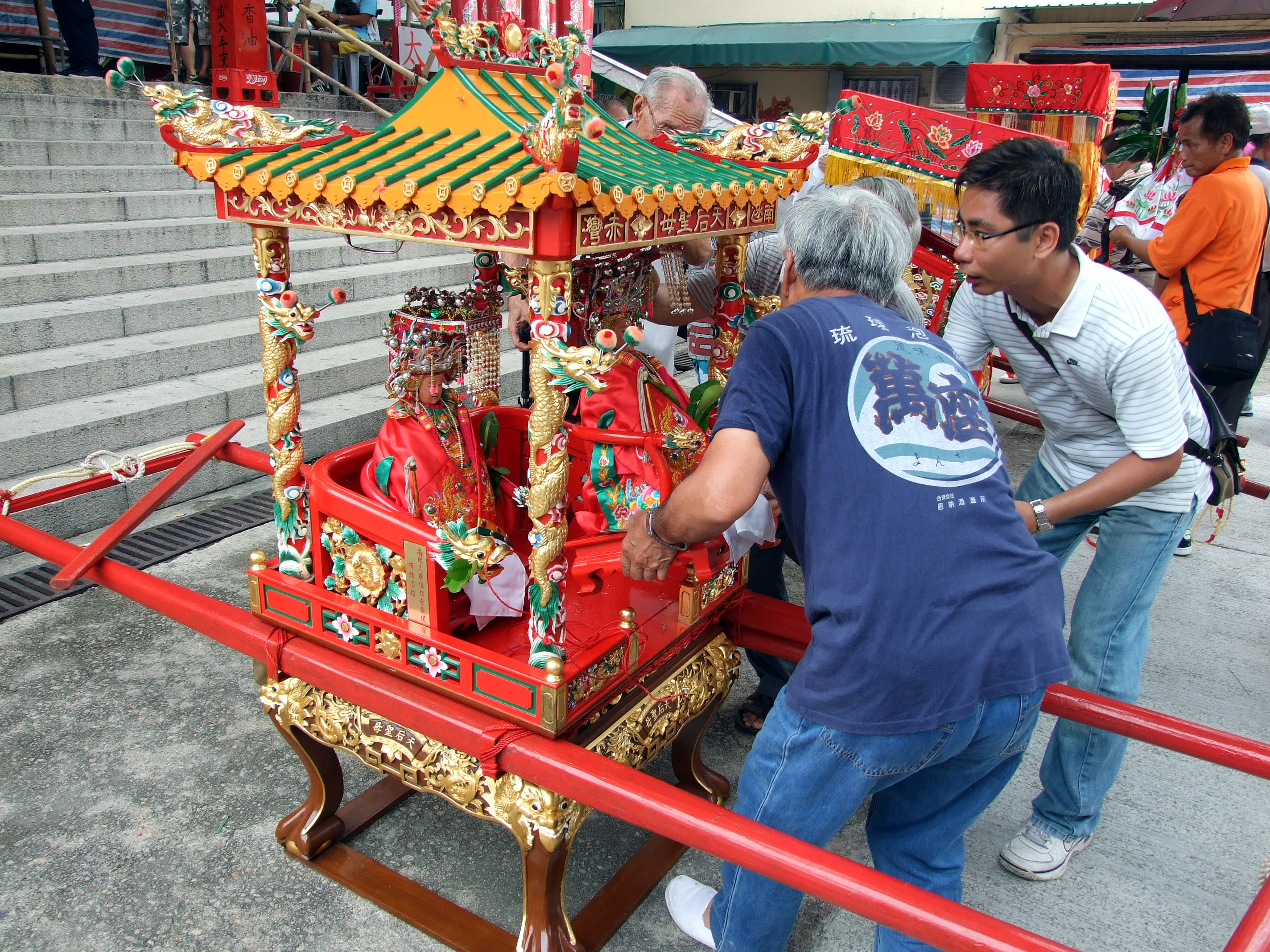 中文（香港）: 南氹天后被送到長洲太平清醮神棚